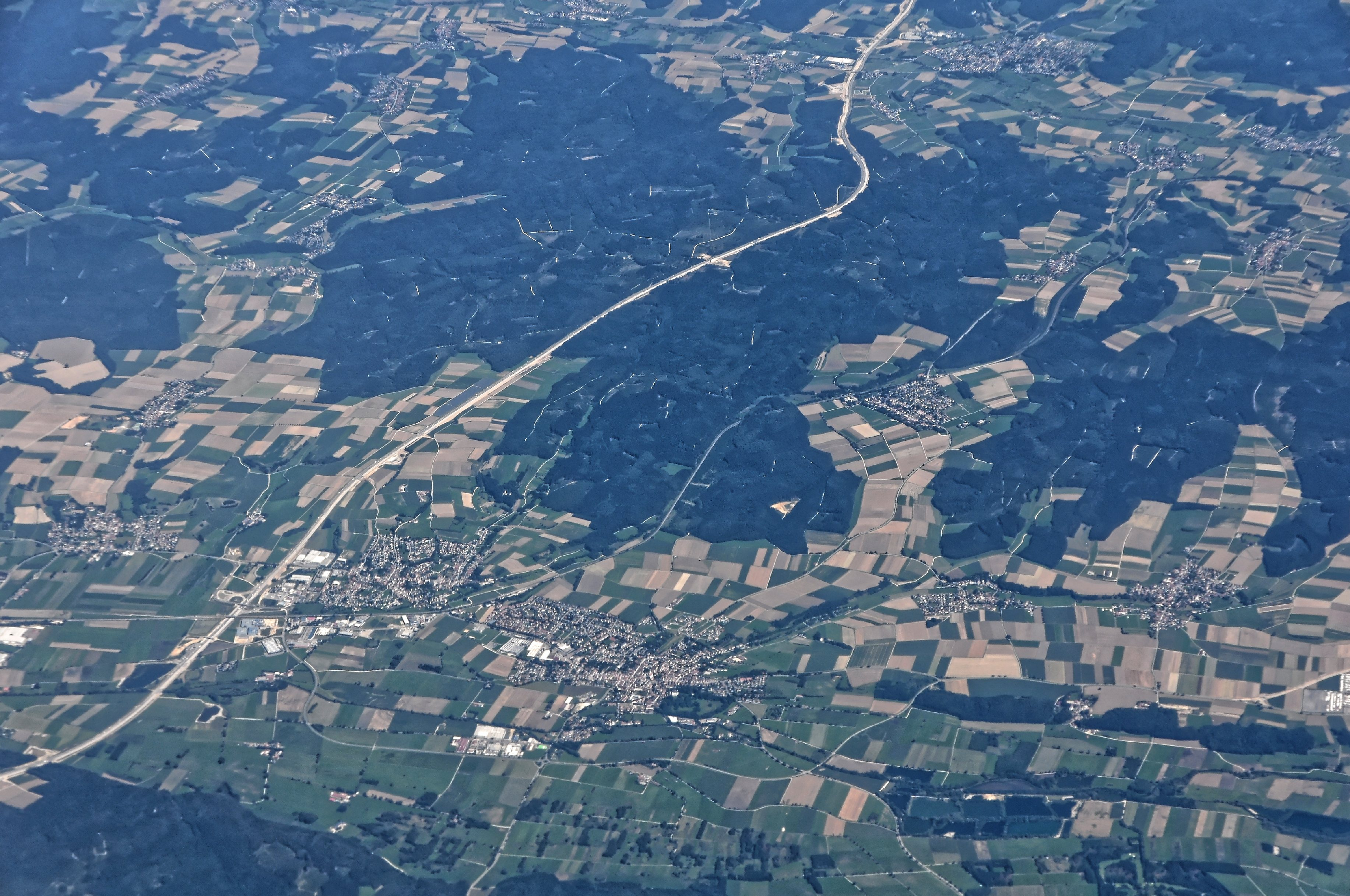 Bilder vom Flug -Rom-Düsseldorf-Hamburg 2013 Dieses Foto entstand in Zusammenarbeit mit Stadtbesichtigungen.de Die Seiten Stadtbesichtigungen.de, der dazugehörige Reise Blog sowie die Facebookseite: Stadtbesichtigungen Rom dürfen dieses Bild für Ihre Veröffentlichungen ohne den Hinweis auf Wikipedia, Commons bzw der Lizenz verwenden. Die Verantwortlichen habe von mir (Ra Boe) die Originaldaten zur freien Verfügung übermittelt bekommen.